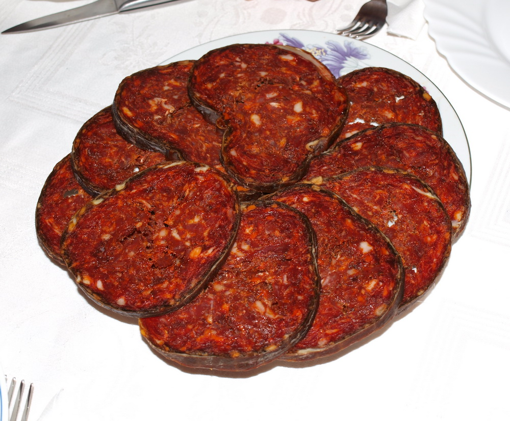 Slavonski kulen, serviran.